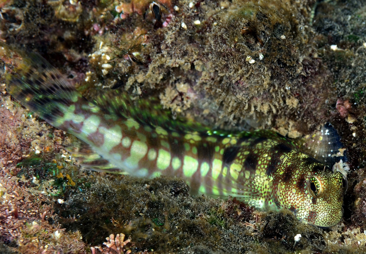 Blenniella gibbifrons à la Réunion.